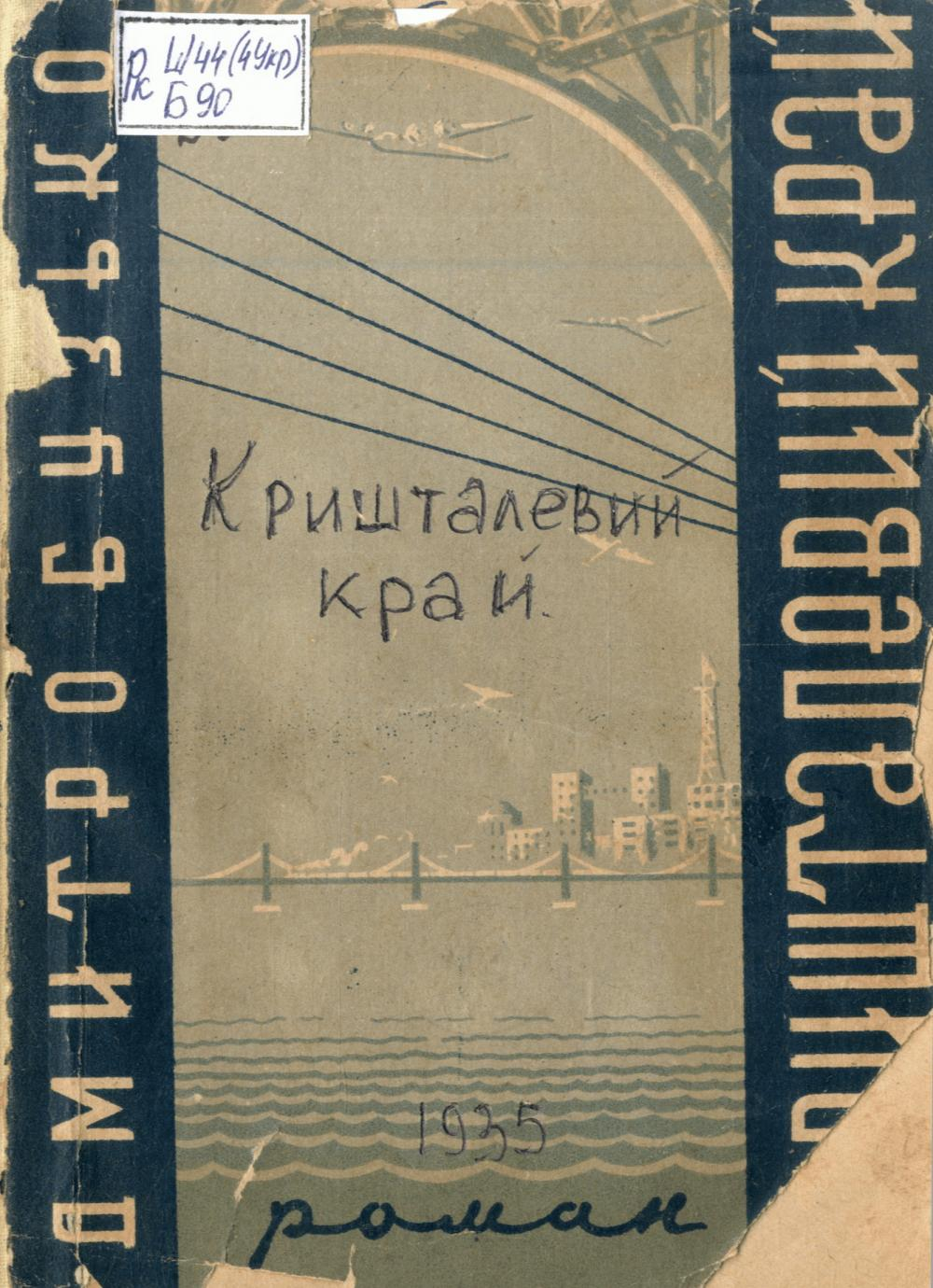 Обкладинка першого видання роману "Кришталевий край"